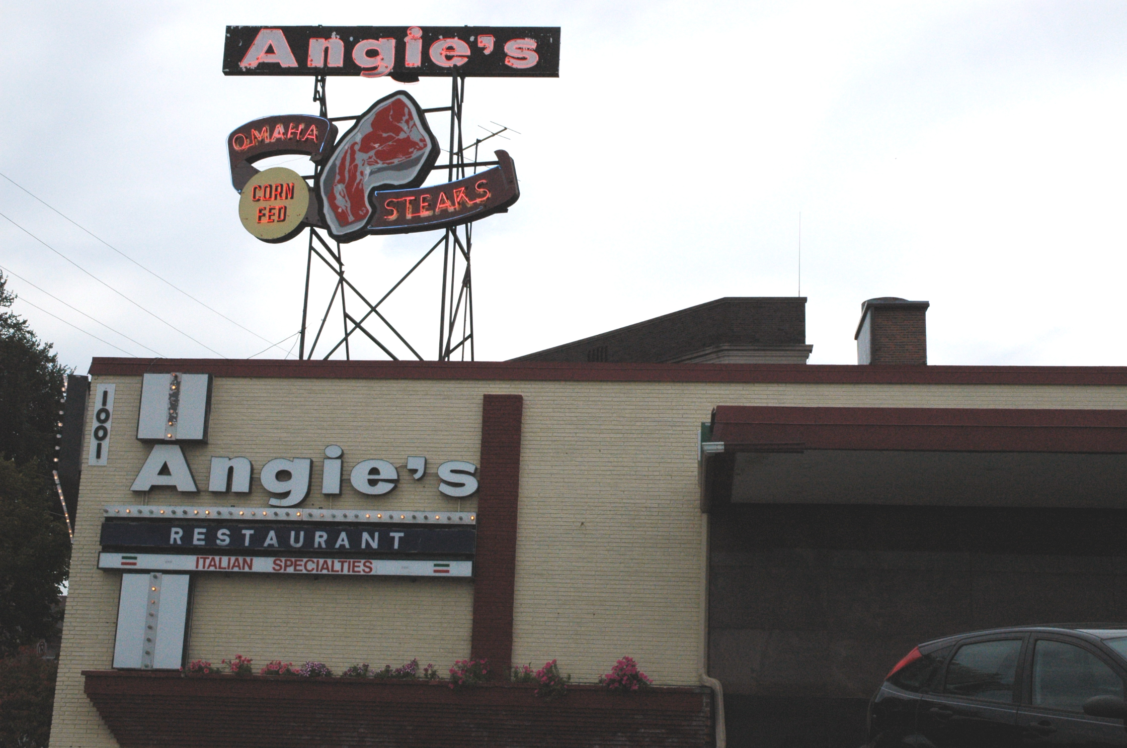 Angie's Restaurant on Omaha, Nebraska.